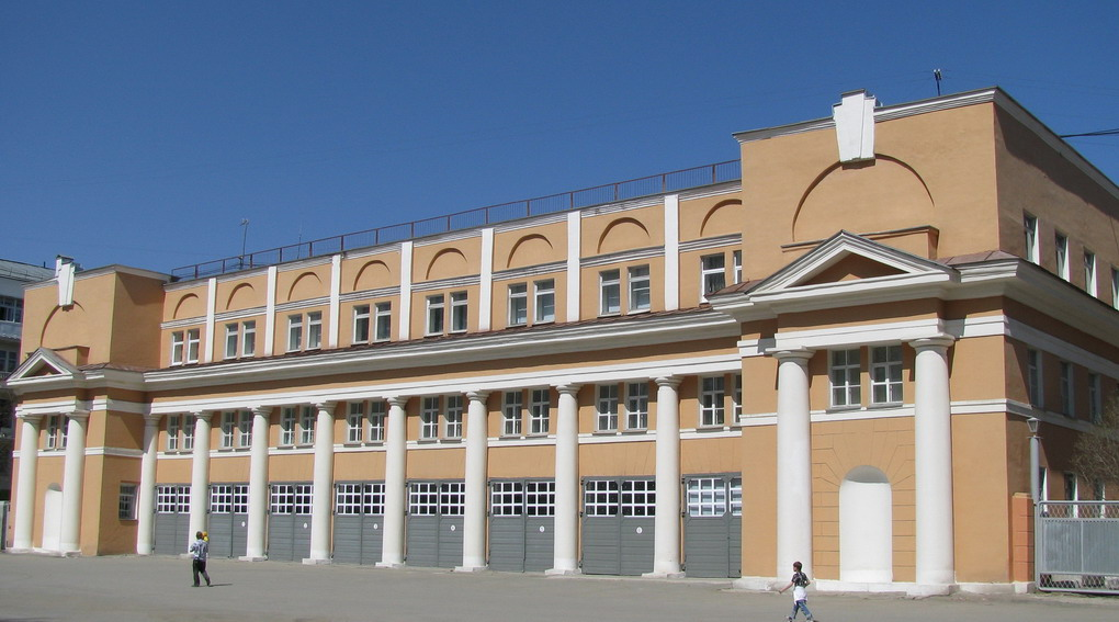 Пожарная часть УрИГПС